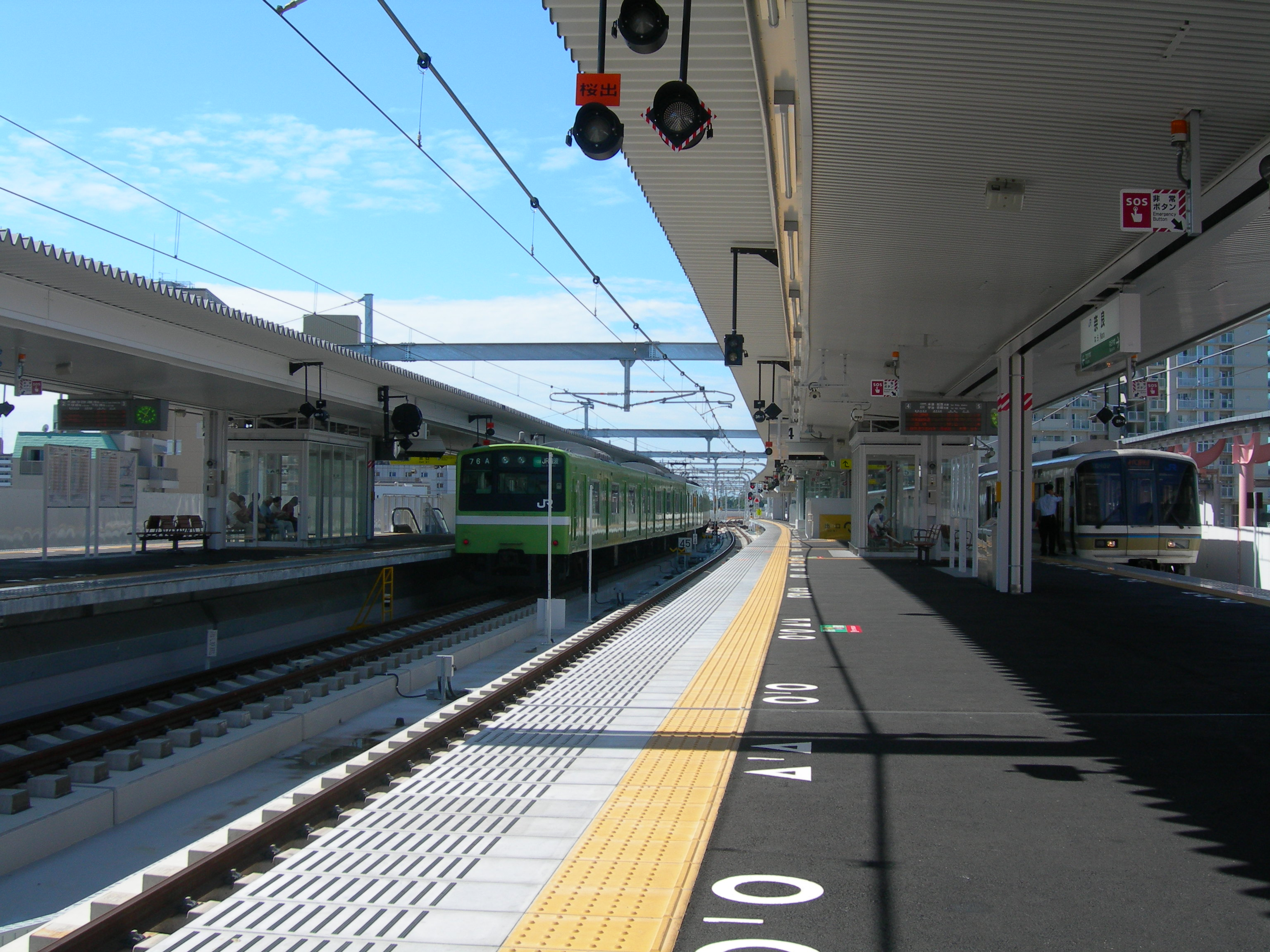 奈良駅プラットホーム